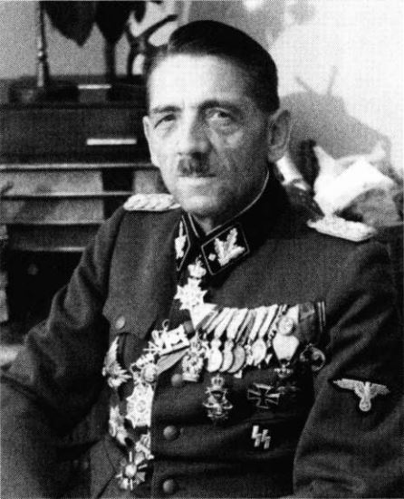 Il generale SS Artur Phleps, il giorno del suo 61° compleanno, 29 novembre 1942